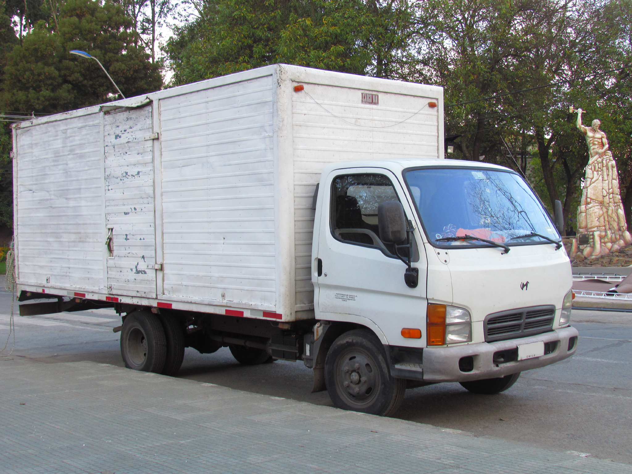 Hyundai HD 65 2005